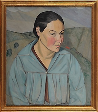 Retrato de mujer con paisaje de fondo.